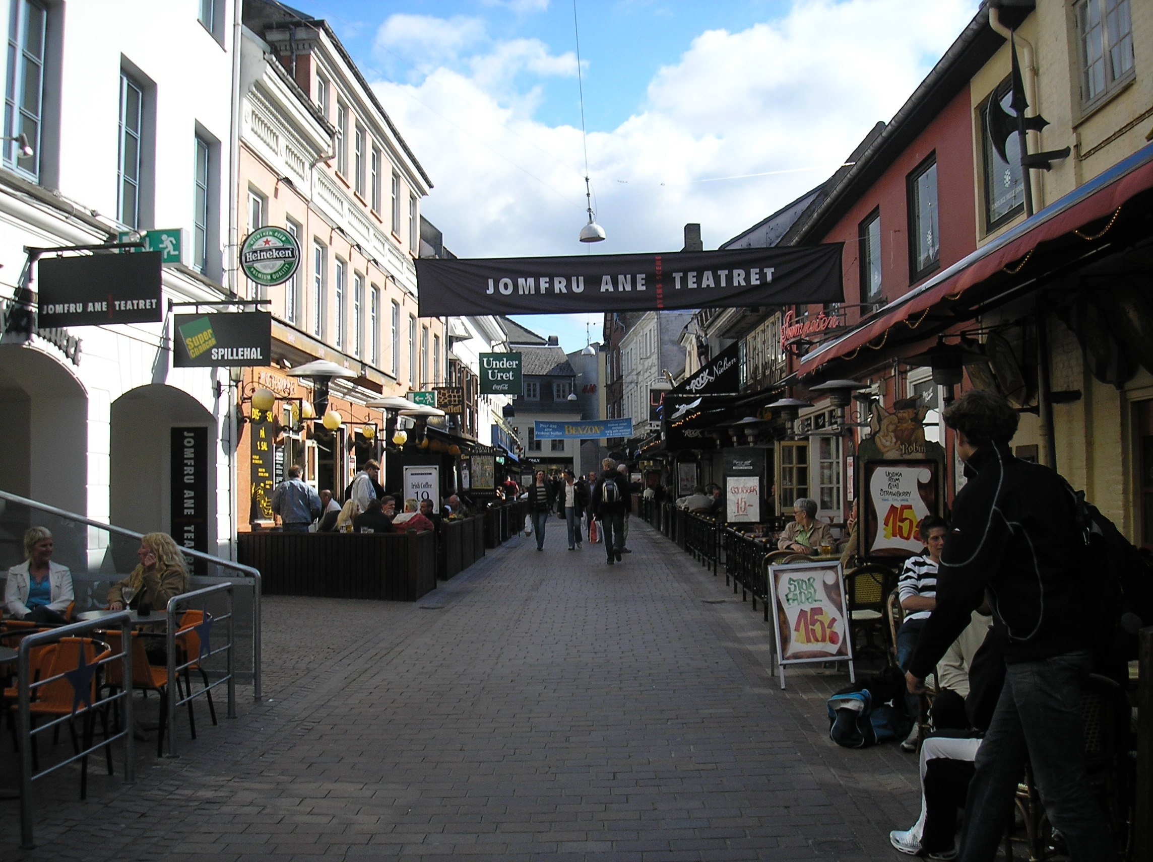 Foto tomada por Jorge González González. Picture taken by Jorge González González.